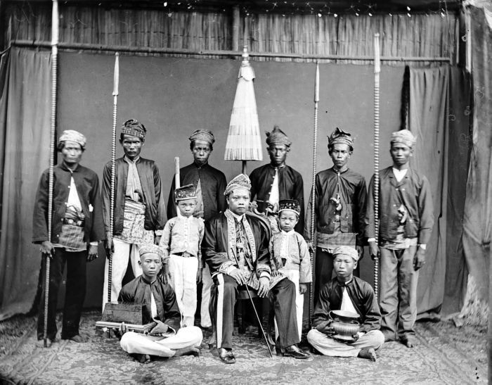 Negatief. Portret van de ronggo van Banjarmasin met gevolg en kinderen